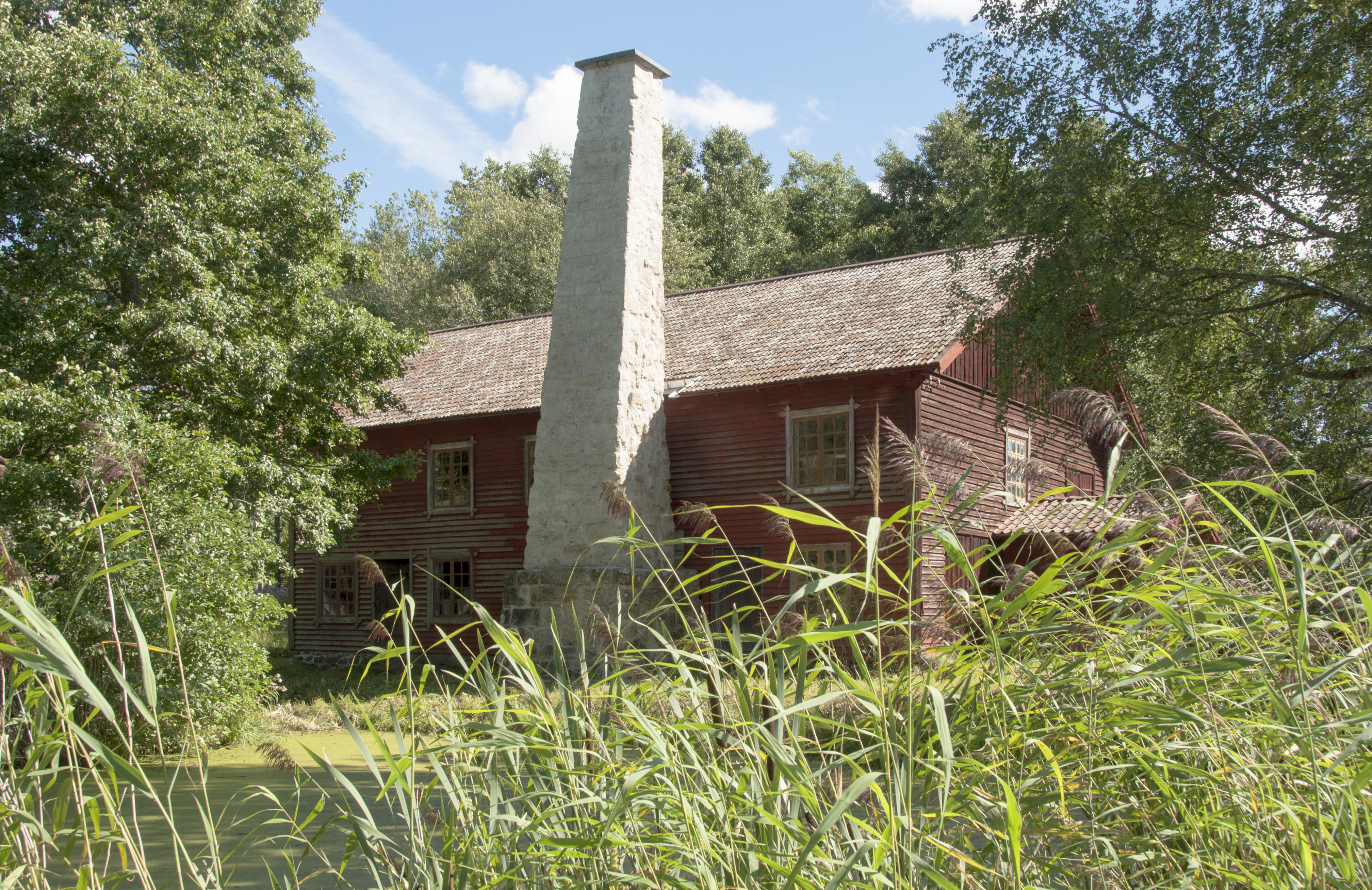 Österängs ångsåg och kvarn på Gamlegården. Uppförd 1860